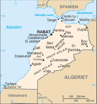 Carte du Maroc